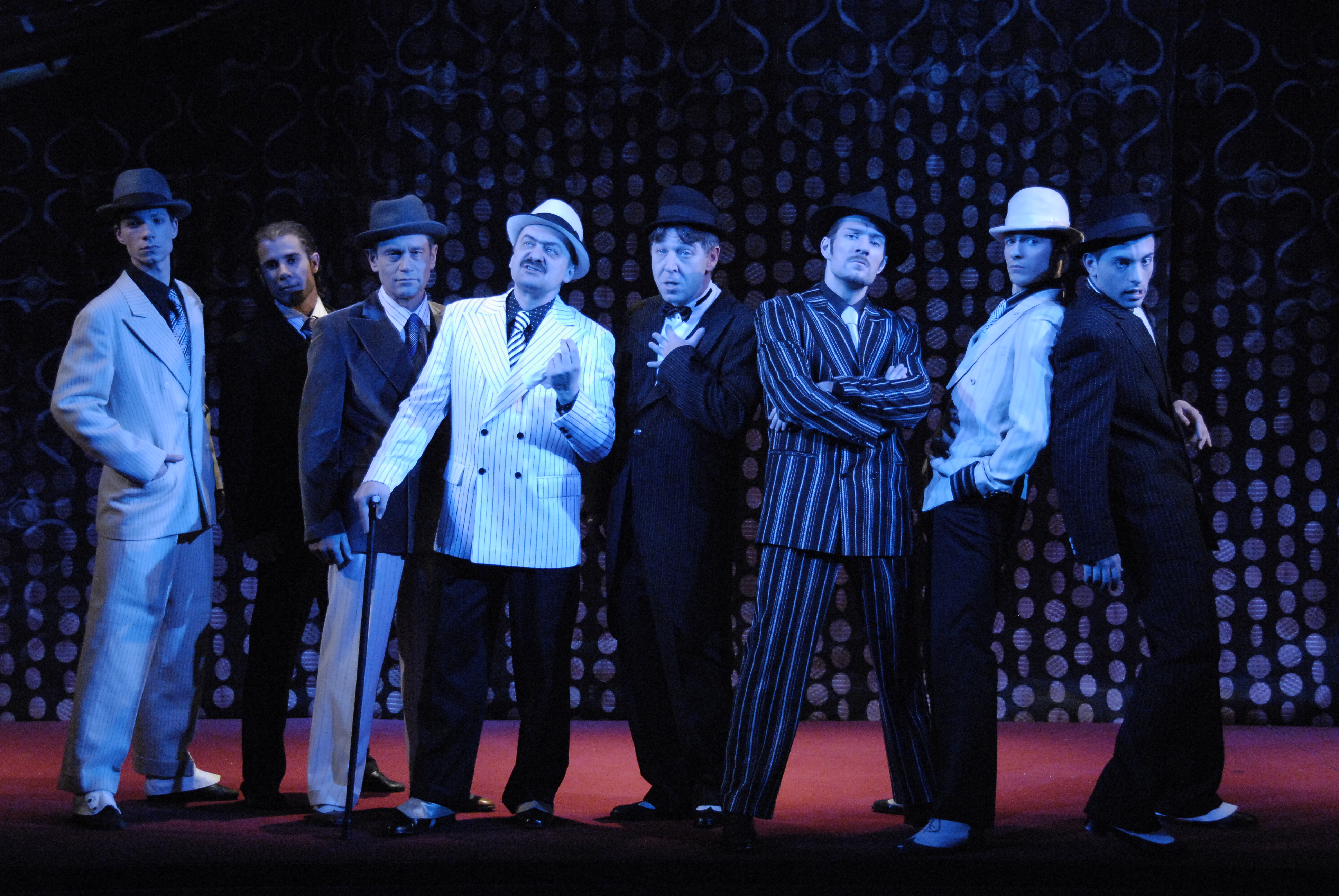 Premijera predstave "Neki to vole vruće"